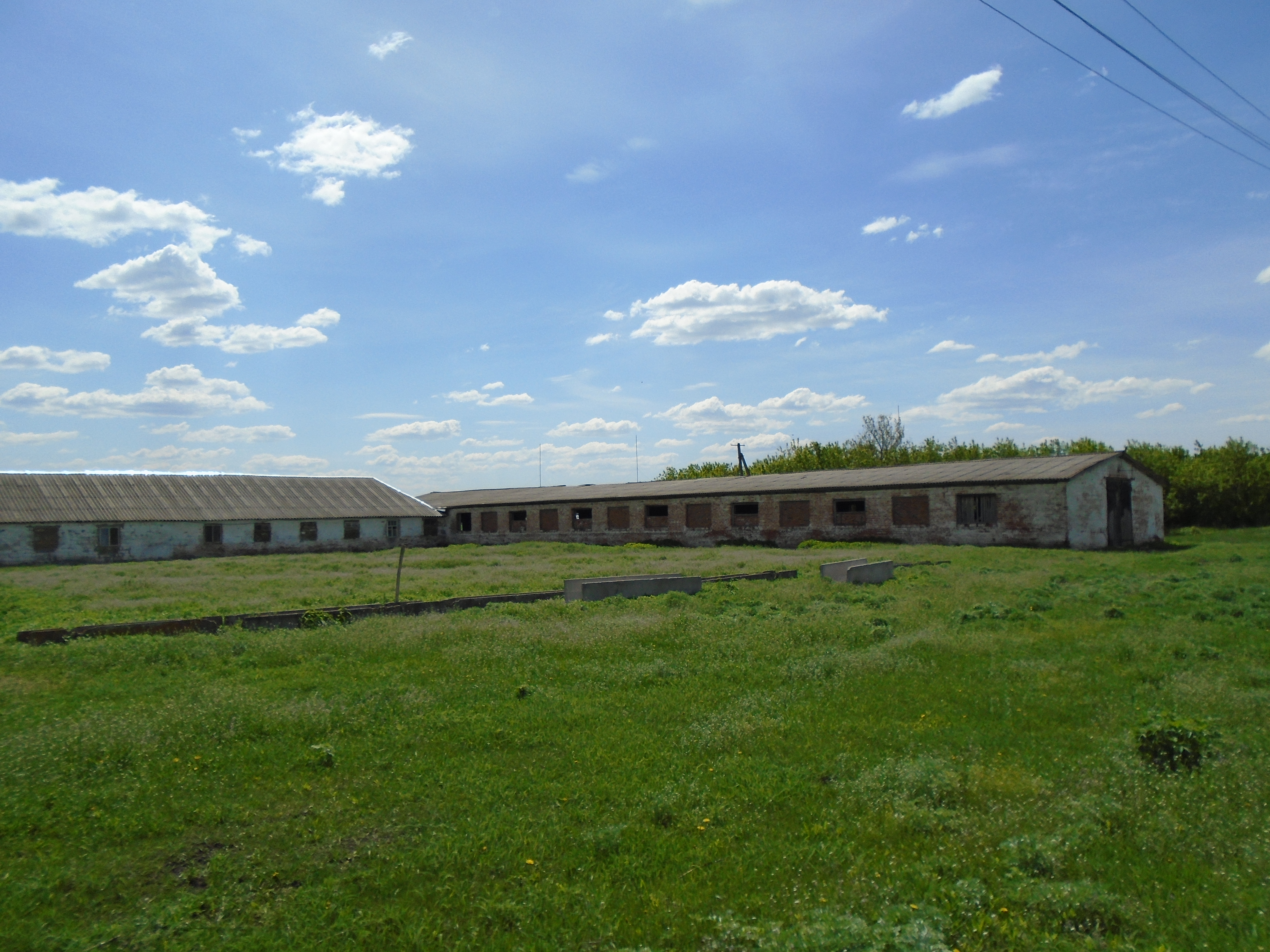 Ферма села Первомайське